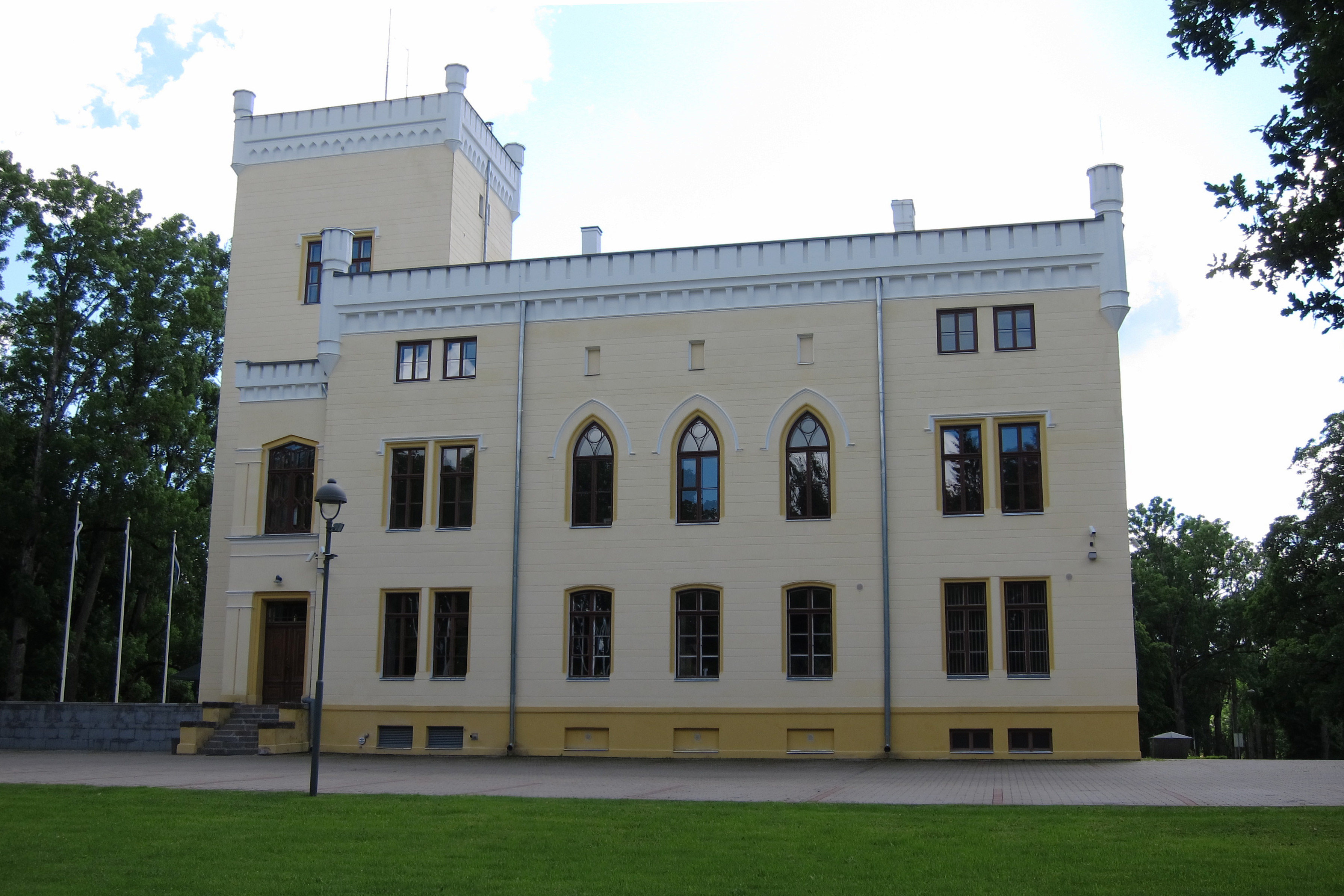 Alu mõisa peahoone